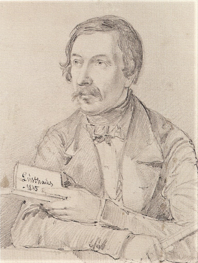 Carl Friedrich Beisbarth. Porträt zur Zeit der von ihm vorgenommenen zeichnerischen Rekonstruktion des Neuen Lusthauses in Stuttgart.